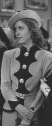 Adelaida Soler- actriz